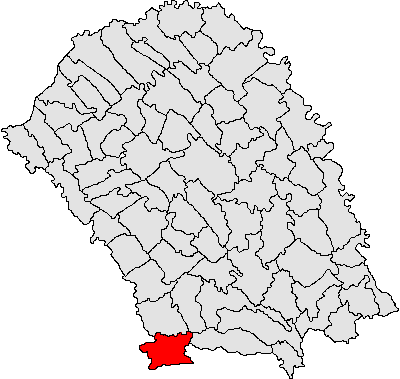 Categorie:Hărţi ale judeţului Botoşani